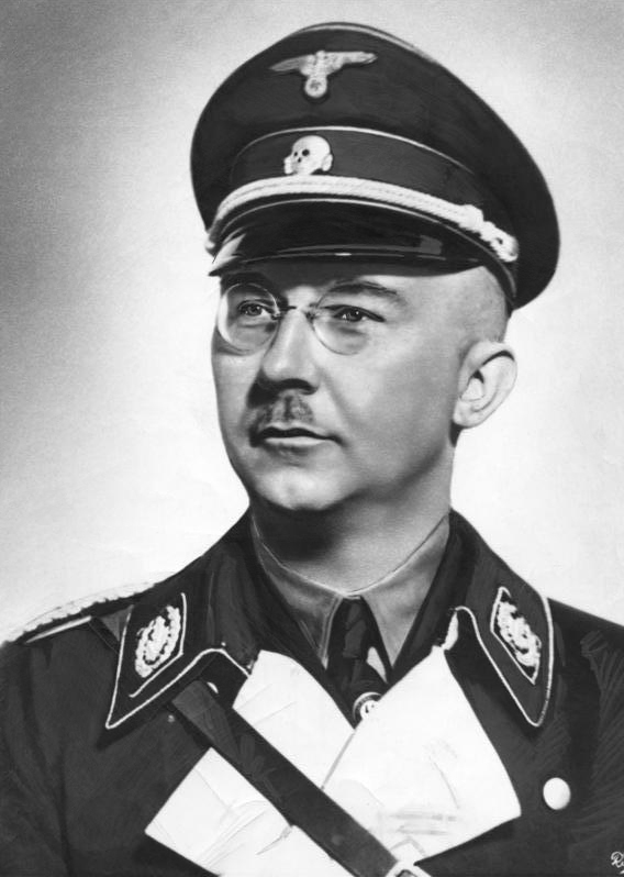 Heinrich Himmler Zentralbild Reichsführer SS Heinrich Himmler (Aufnahme 1938) [Porträt Heinrich Himmler] Abgebildete Personen: Himmler, Heinrich: Reichsführer der SS, Deutschland (GND 11855123X)